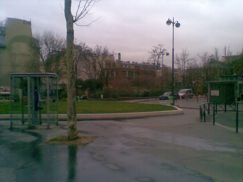 Depuis la rue du faubourg Saint-Denis, vue sur le square Alban-Satragne et le mur pignon de l'immeuble du 105 faubourg Saint-Denis avec le portrait de Saint-Vincent de Paul réalisé en lames d'aluminium